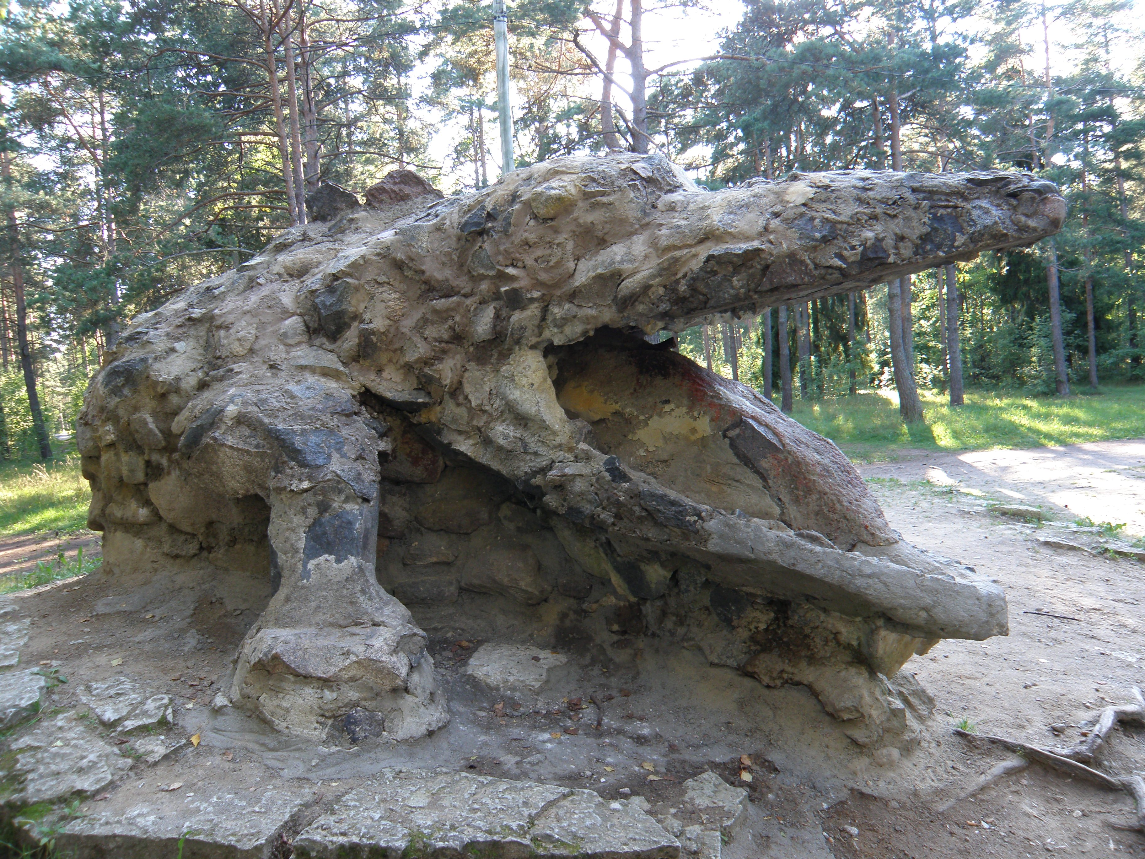 Glehni krokodill